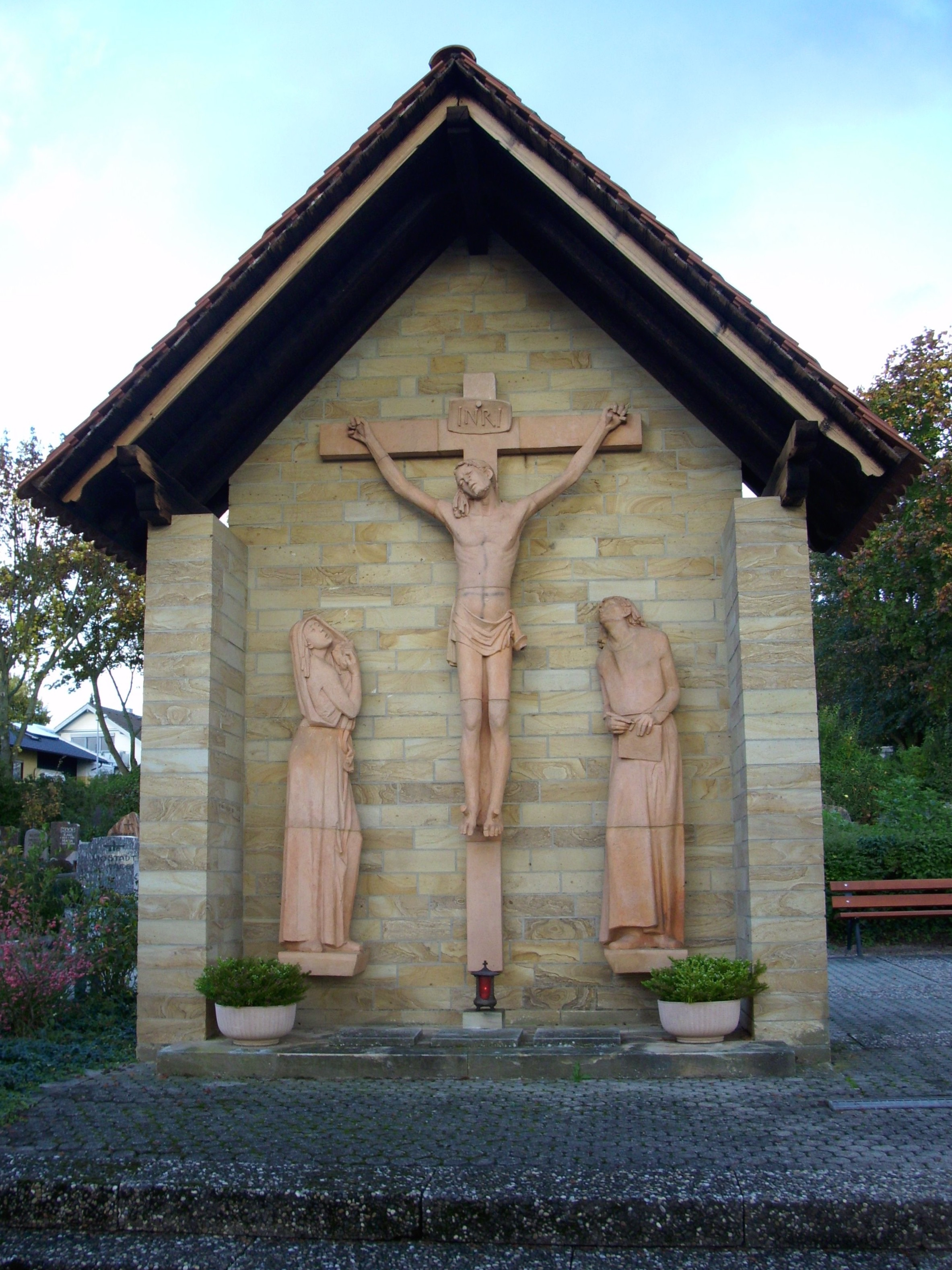 Friedhof 1813 eröffnet - Kreuzigungsgruppe, Terrakotta, 1954, Bildhauer Adam Winter, Mainz-Kastel